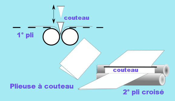 principe de la plieuse à couteau. (réalisation perso)